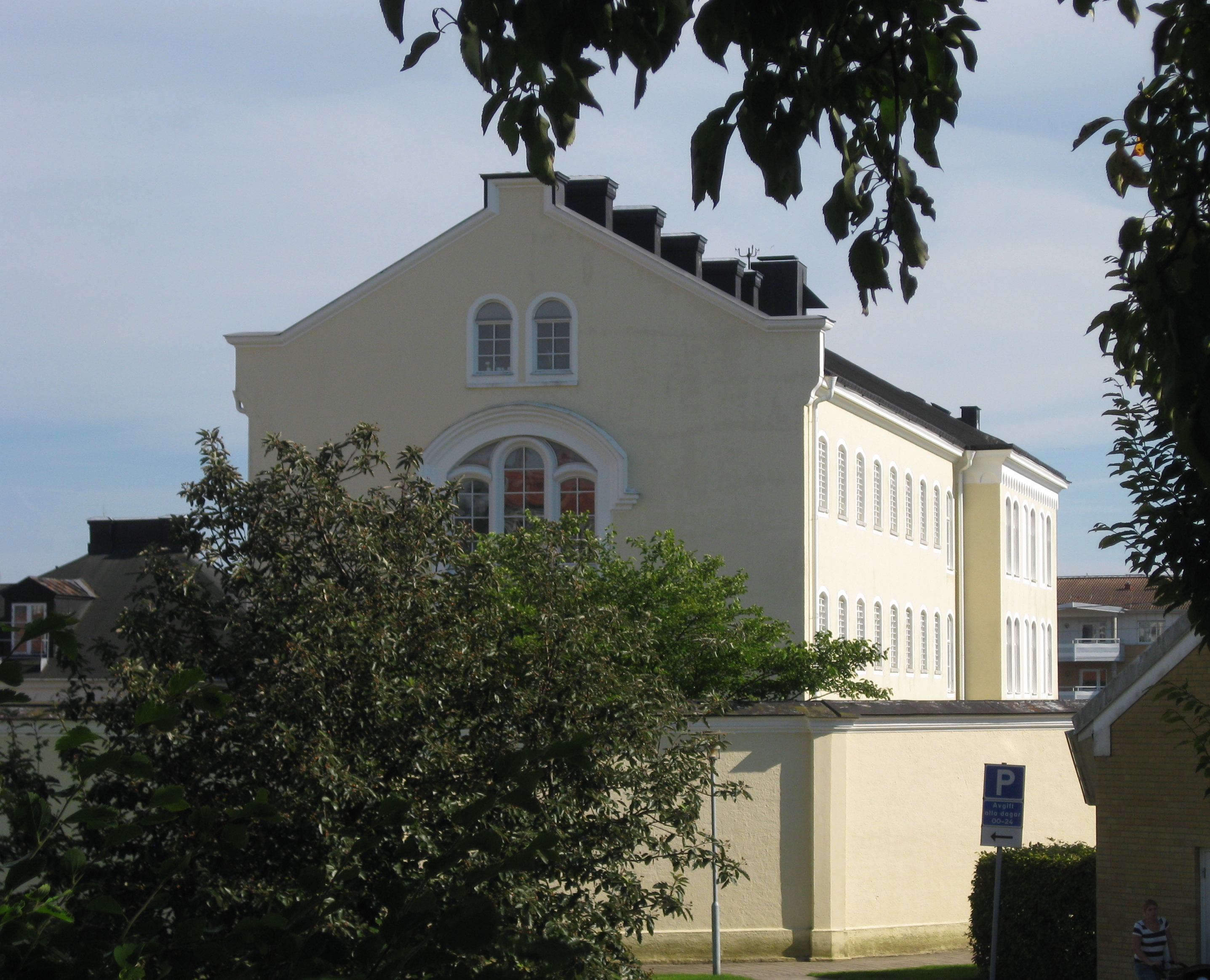 Fängelset, ibland kallat Hvita Briggen, i Ystad